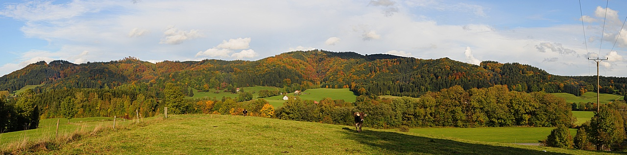 Die Adelegg im Herbst